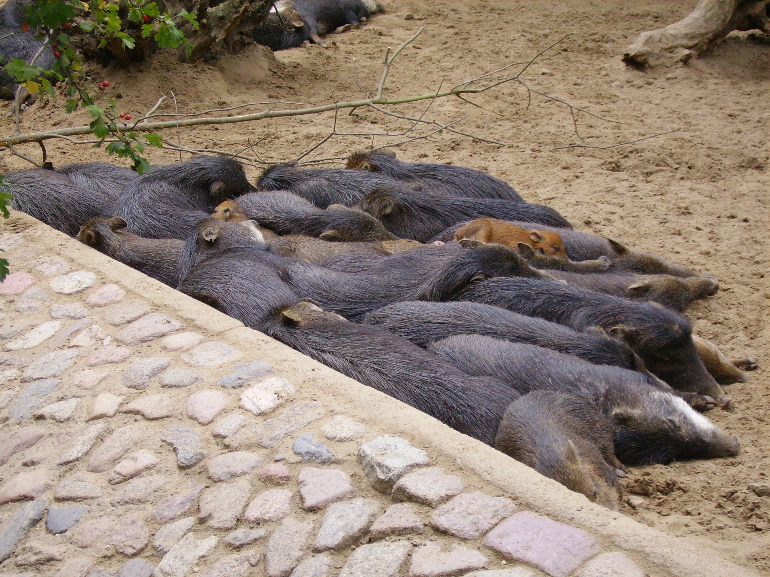 Nabelschweine